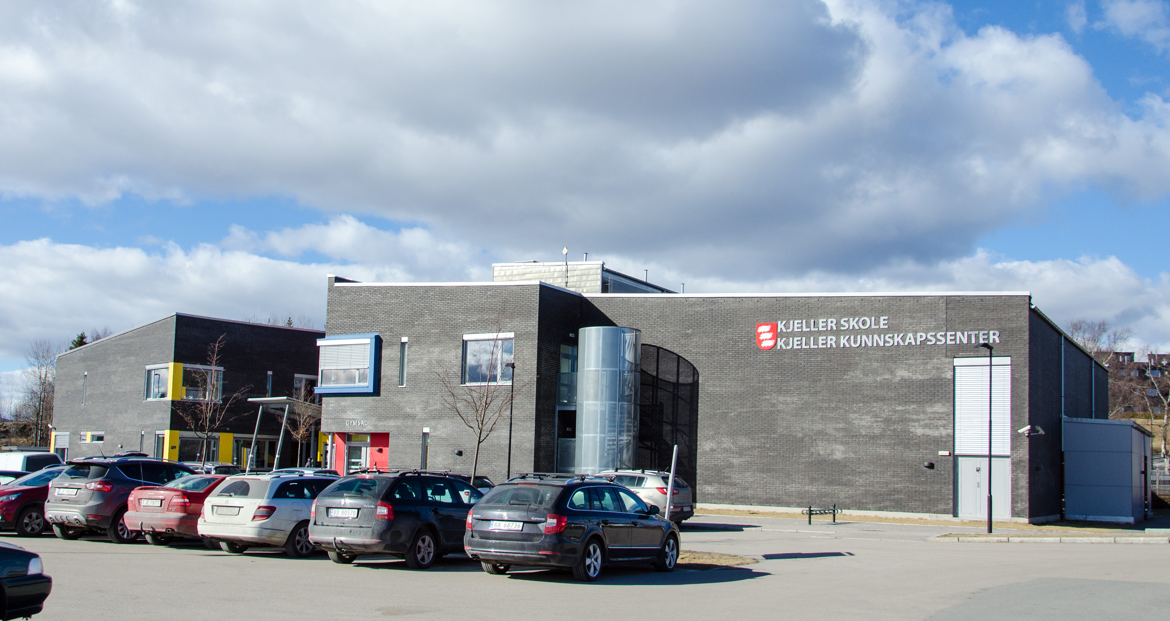 Kjeller skole og kunnskapssenter